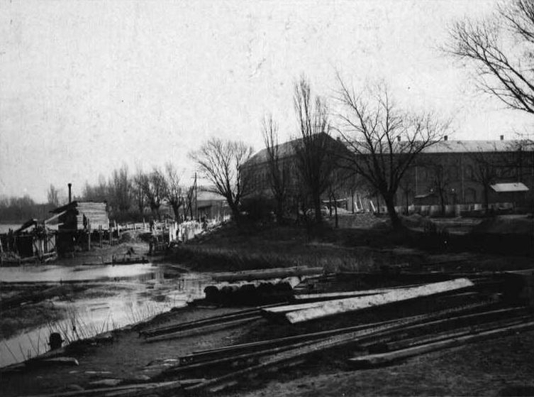 Hærens Geværfabrik og Ny Tøjhus anlægges på opfyldning af Kalvebod Strand, ca. 1887.